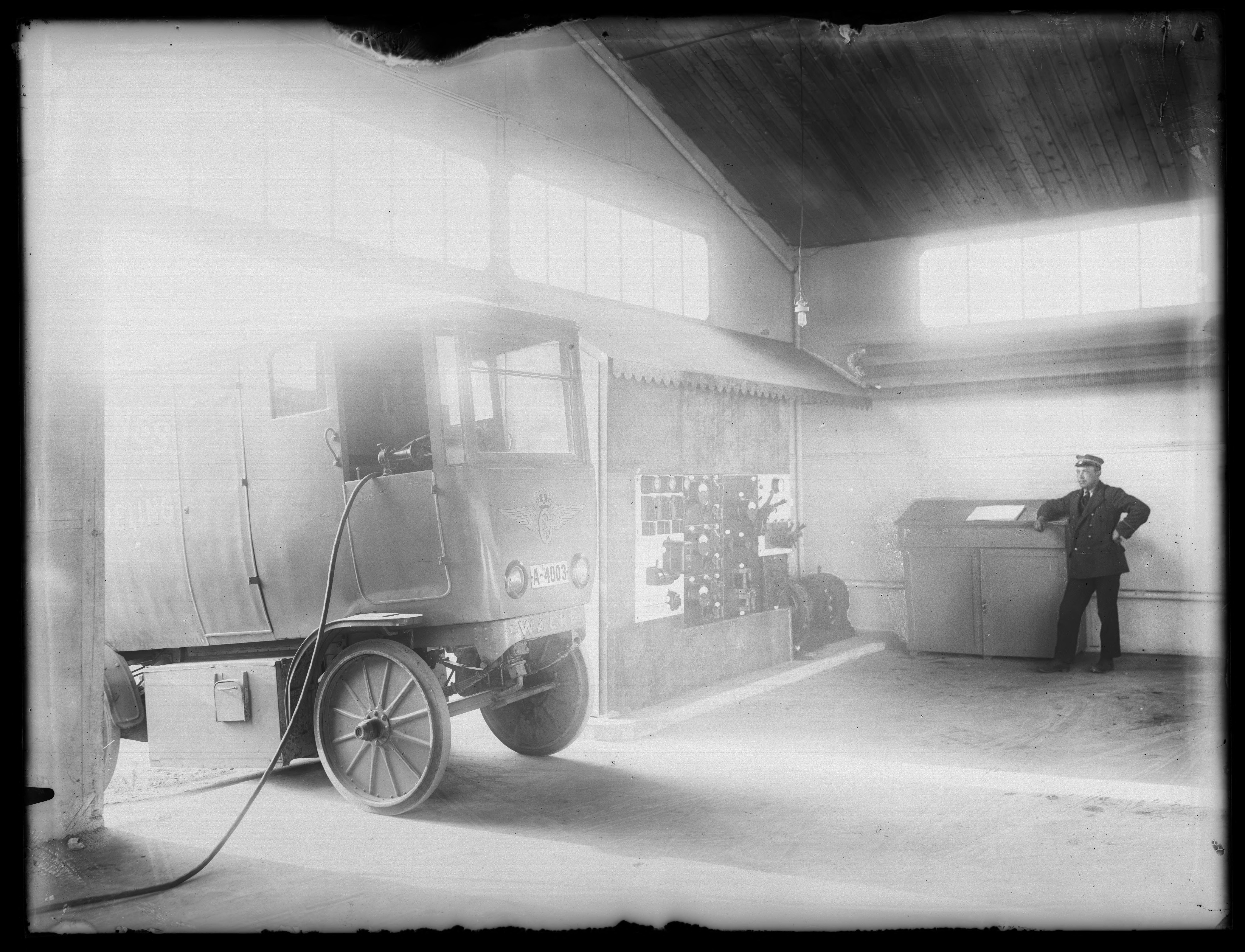 Bildet er hentet fra Nasjonalbibliotekets bildesamling. Anmerkninger til bildet var: Påskrift arkivark: Elektrobil Eldste arkivnummer: 507 Oslo, Oslo, Oslo